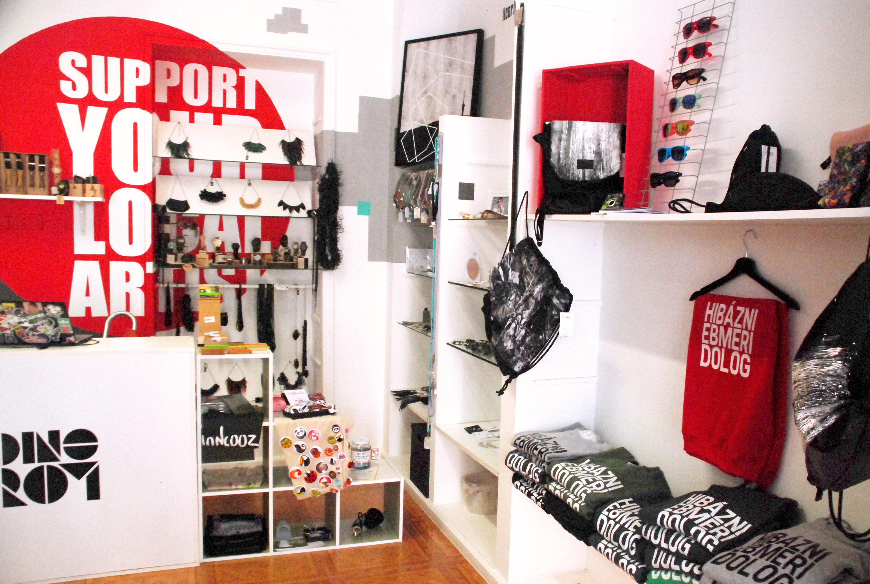 Monokrom Design Store - belső tér